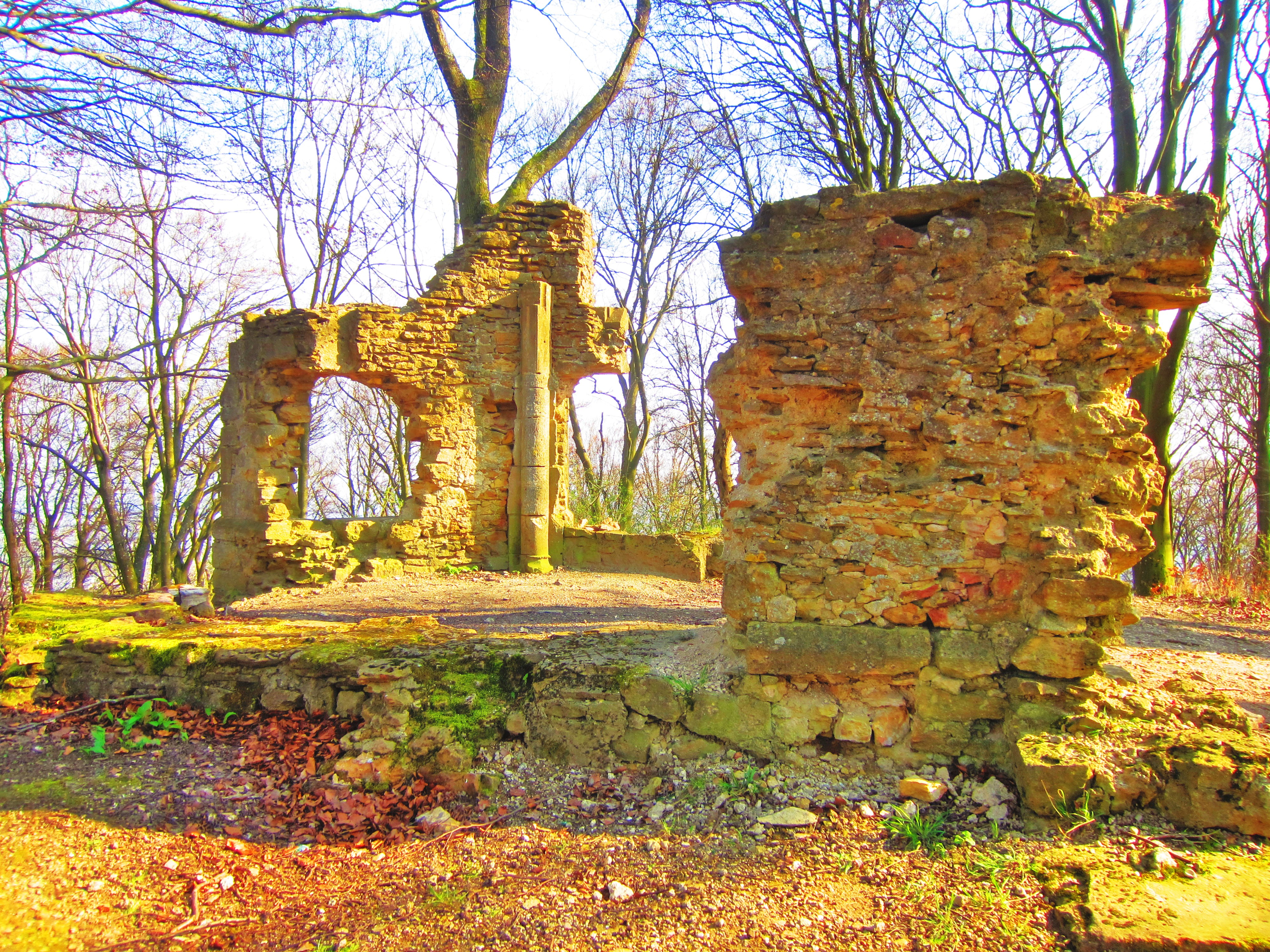 Beuvange ste anne